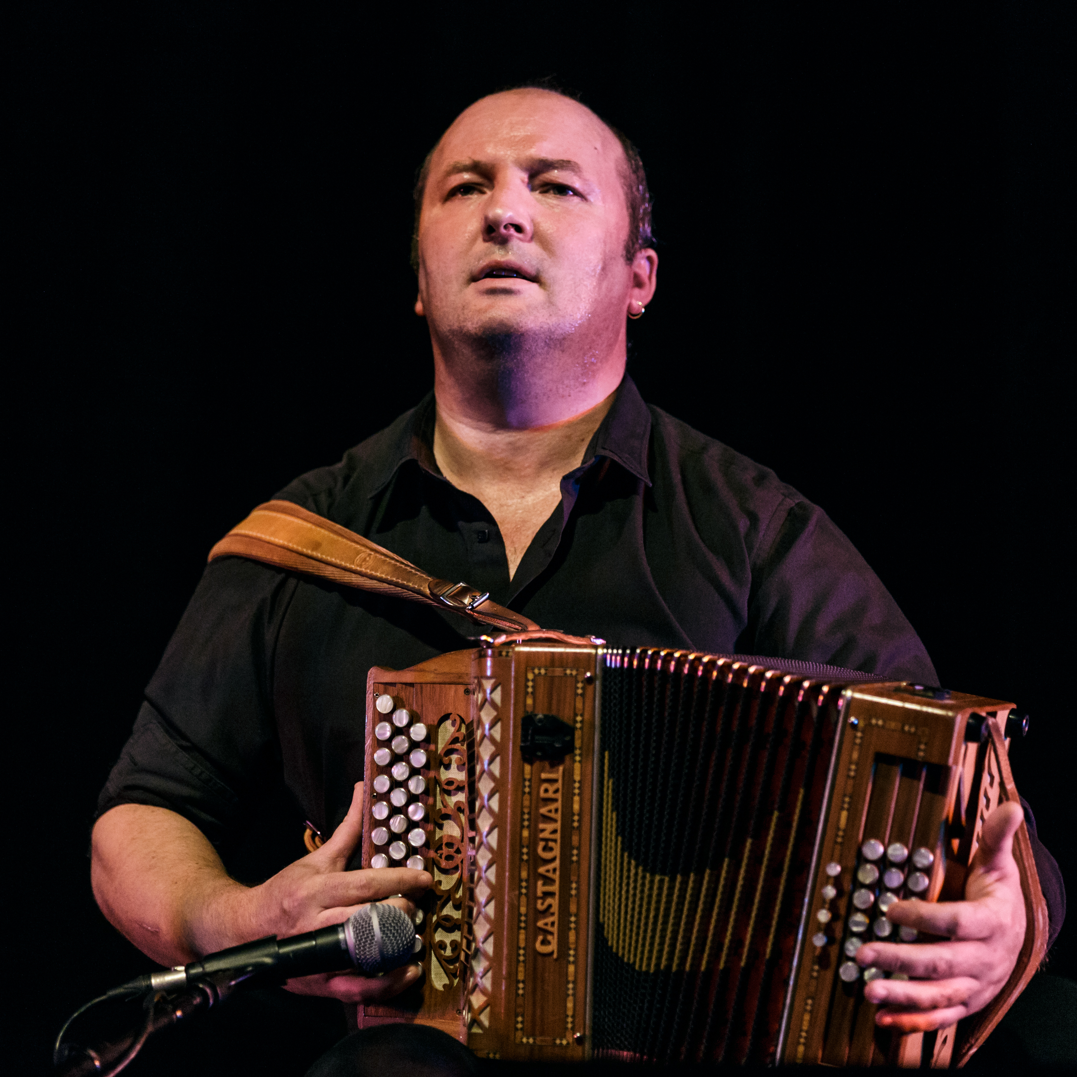 Les Frères Guichen en fest-noz lors du festival Yaouank le 19 novembre 2016 au MusikHall du Parc Expo de Rennes.